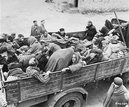 Ehemalige Häftlinge des KZ Wöbbelin werden in ein Krankenhaus umquartiert